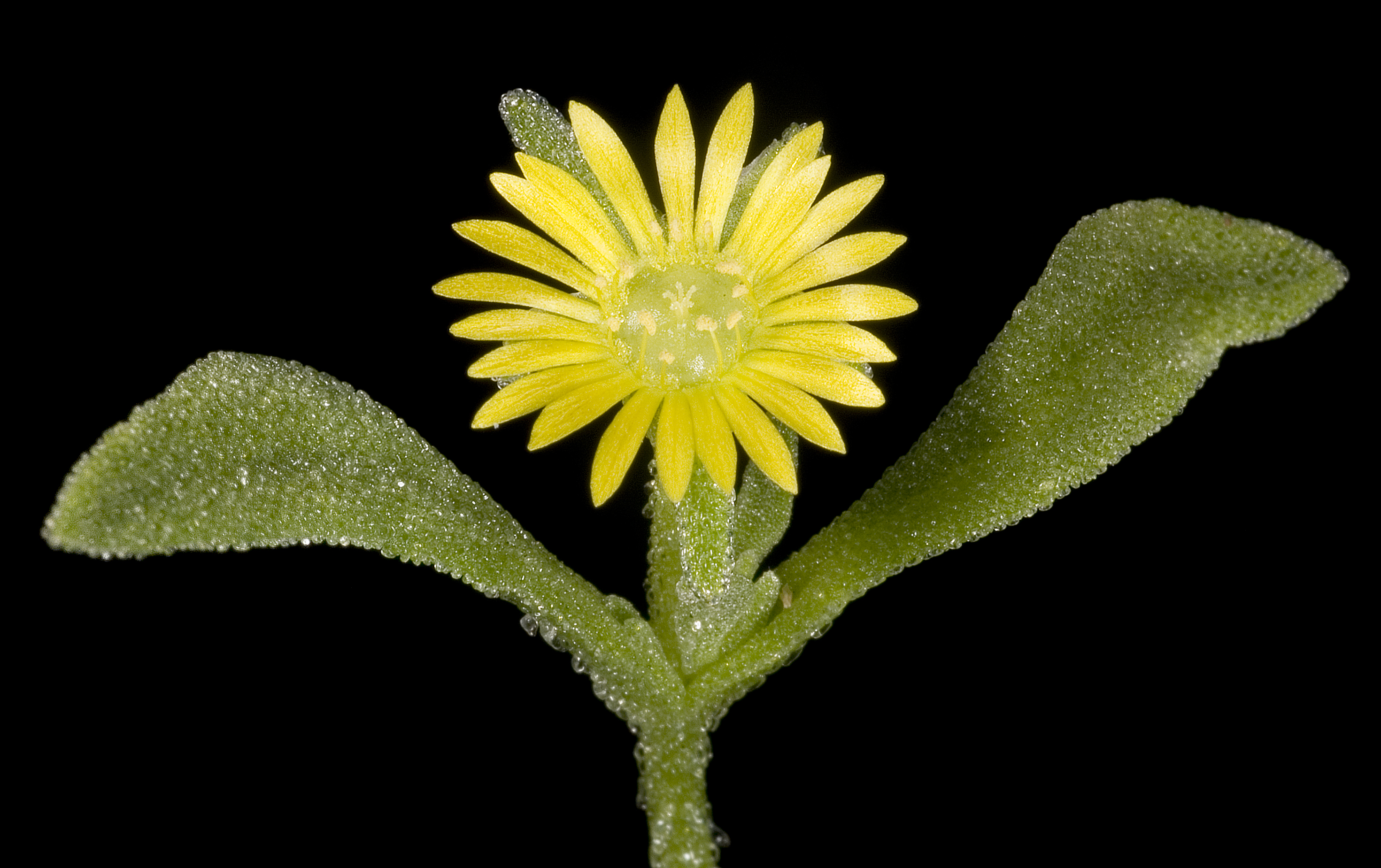 KRT3855